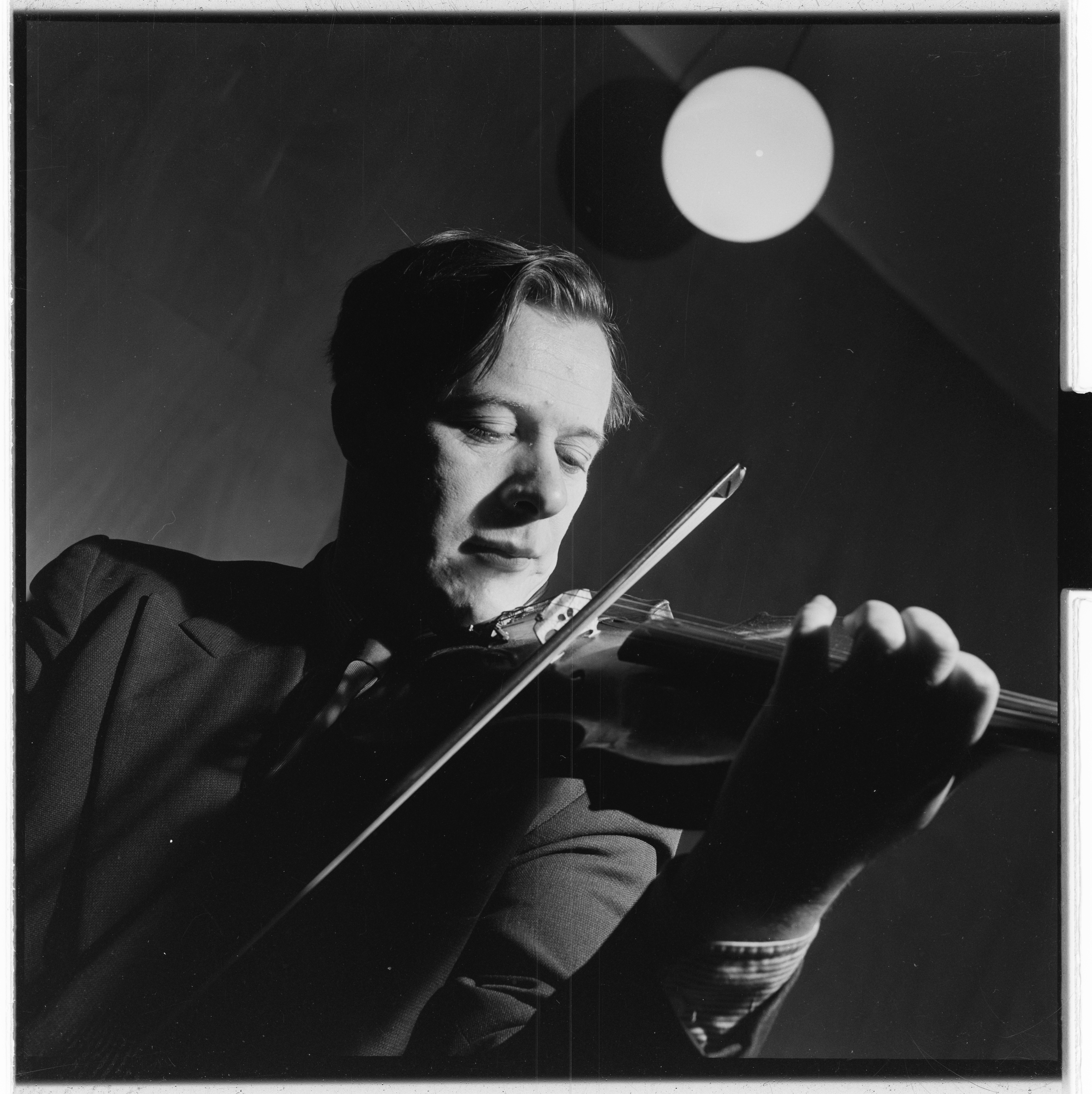 Bildet er hentet fra Arkivverket. Stavanger-ensemblet. NÅ nr. 3 Arkivinstitusjon : Riksarkivet Arkivnavn : Billedbladet NÅ Sted : Norge, Rogaland, Stavanger, Emneord: Ensembler, Musikere Avbildet